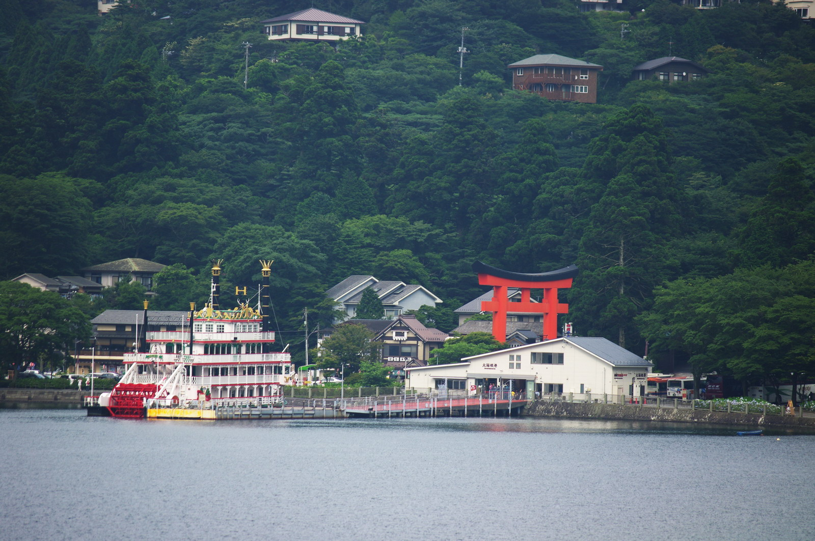 Motohakone